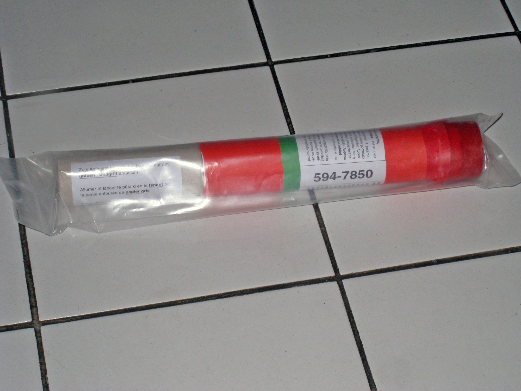 Heulpetarde rot, ALN 594-7850